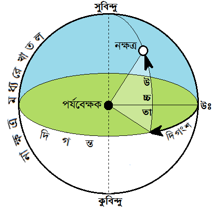 ভূপৃষ্ঠে যে কোনও পর্যবেক্ষক ও তার দৃষ্ট আকাশস্থিত যে কোনও বস্তুর (এক্ষেত্রে একটি নক্ষত্র) অবস্থানের পরিপ্রেক্ষিতে দিগংশ, দিগন্ত, নাক্ষত্র মধ্যরেখাতল, সুবিন্দু ও কুবিন্দুর অবস্থান।